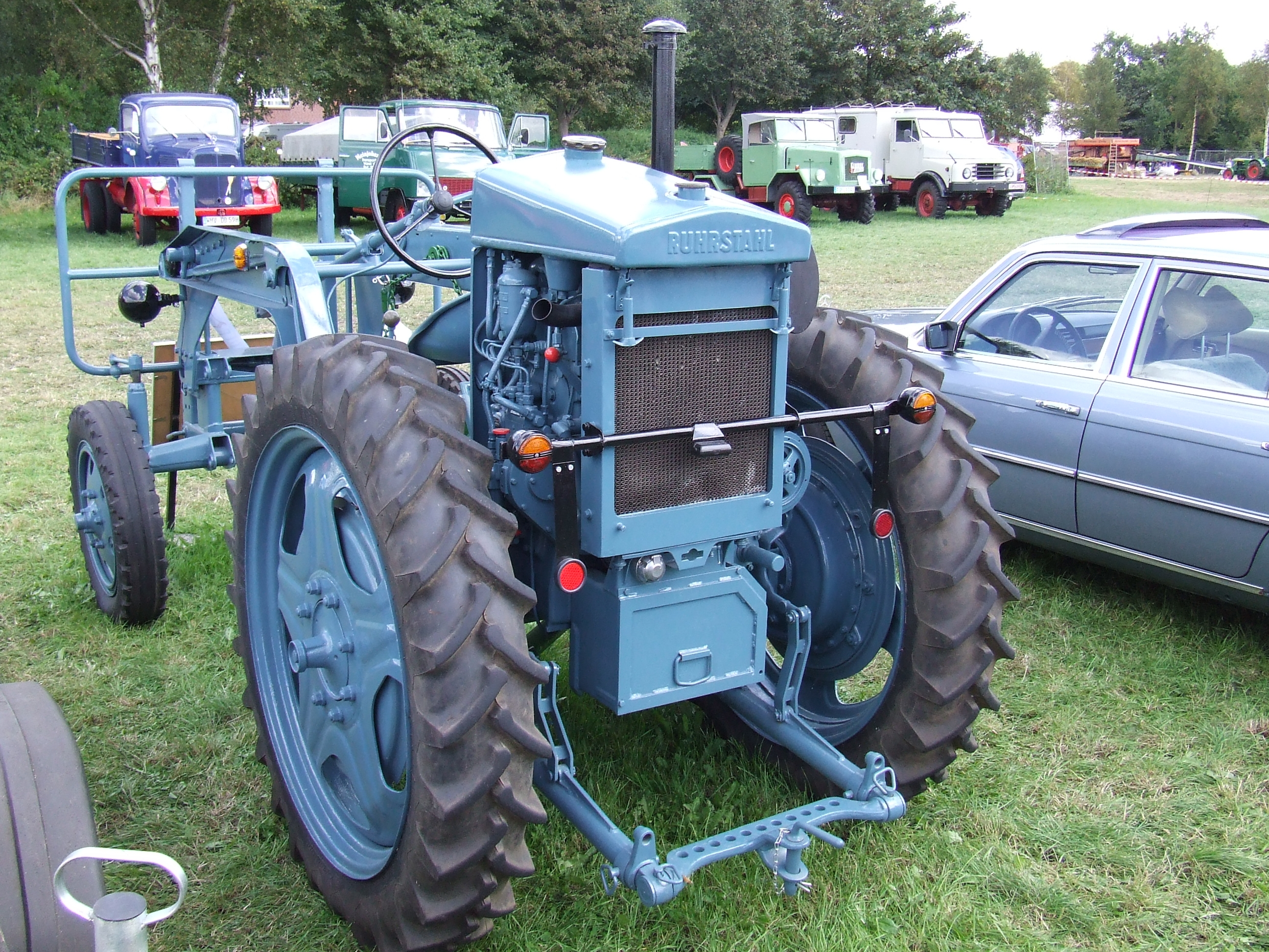 Restaurierter Ruhrstahl-Geräteträger von der Rückseite gesehen